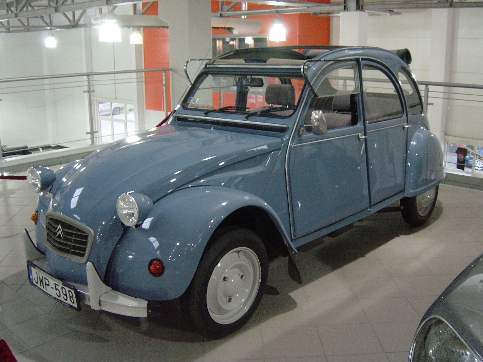 Citroen CV2